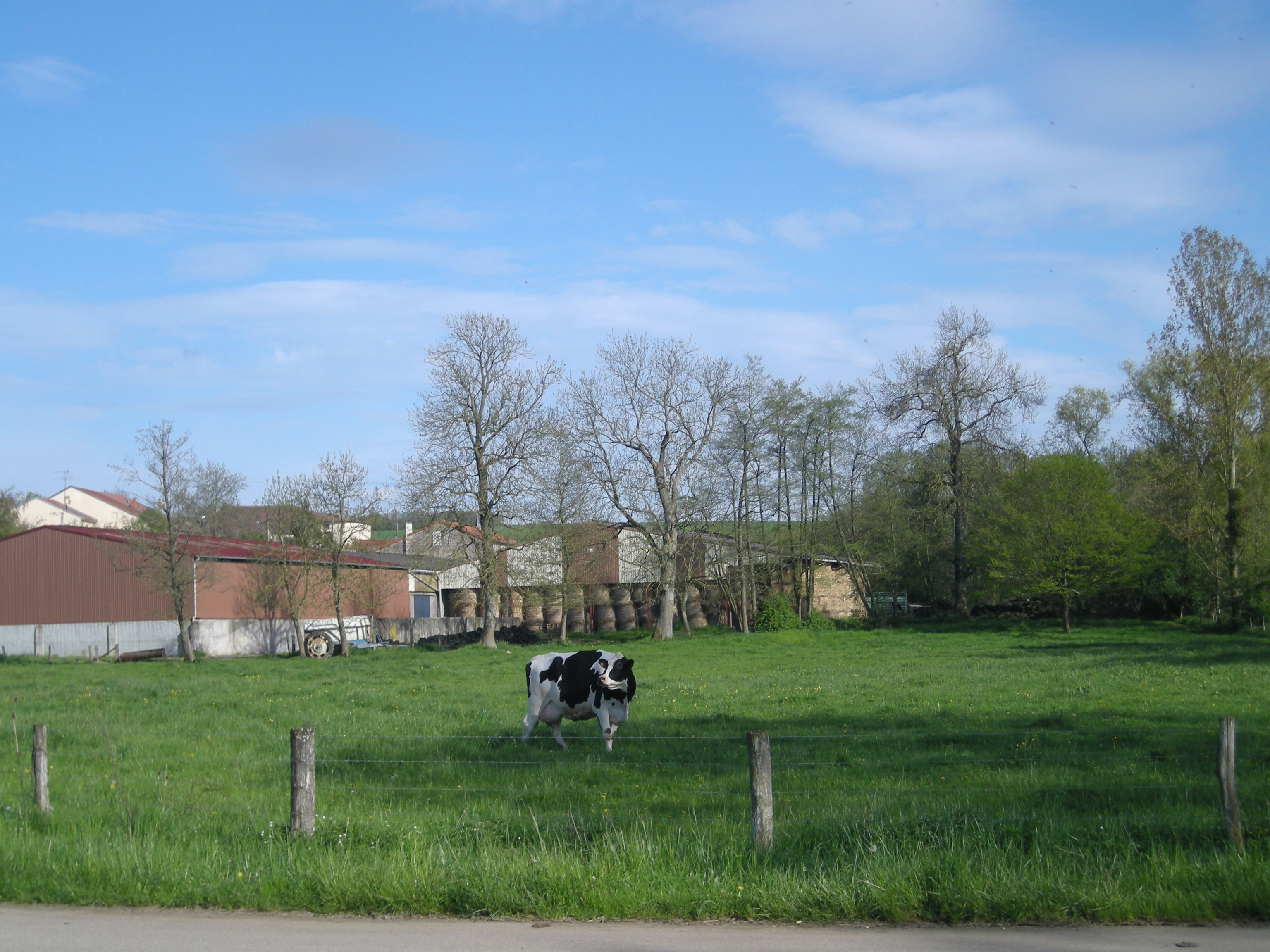 La place de l'élevage à Bralleville (Meurthe-et-Moselle)